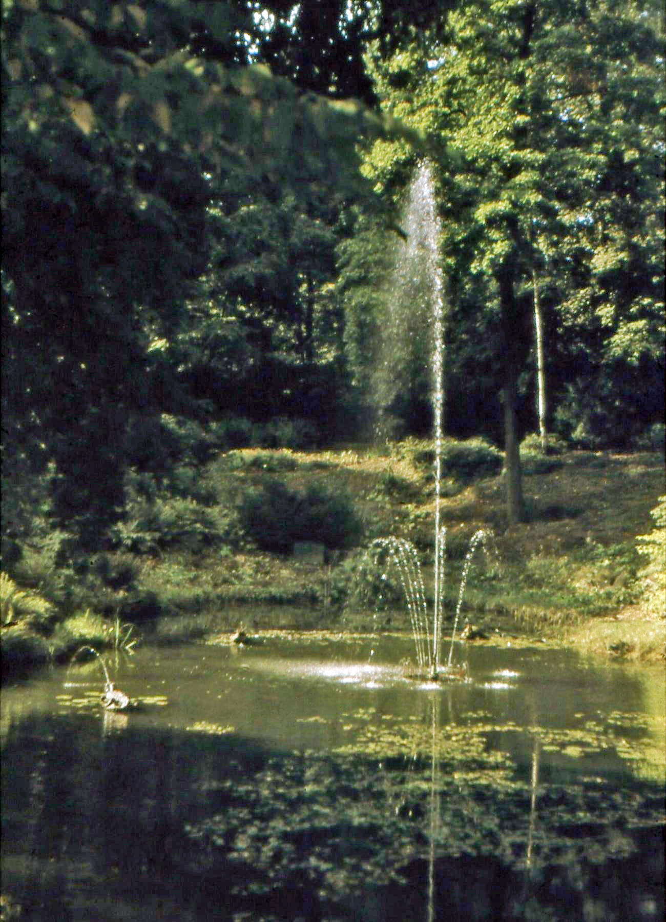 Fontäne im Teich im Stadtpark von Görlitz